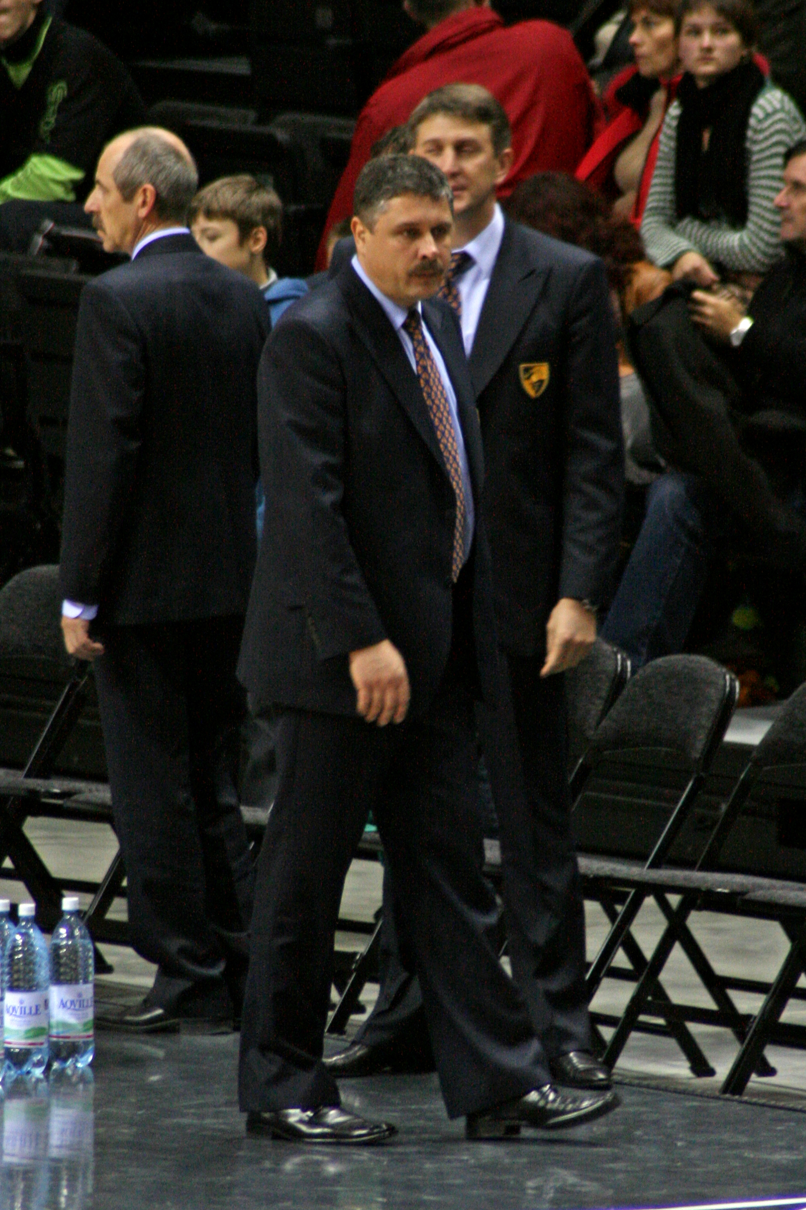 Rimantas Grigas